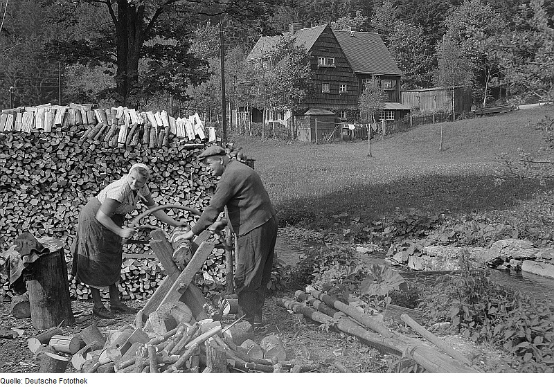 Original image description from the Deutsche Fotothek Rehefeld-Zaunhaus. Altes Paar beim Holzsägen